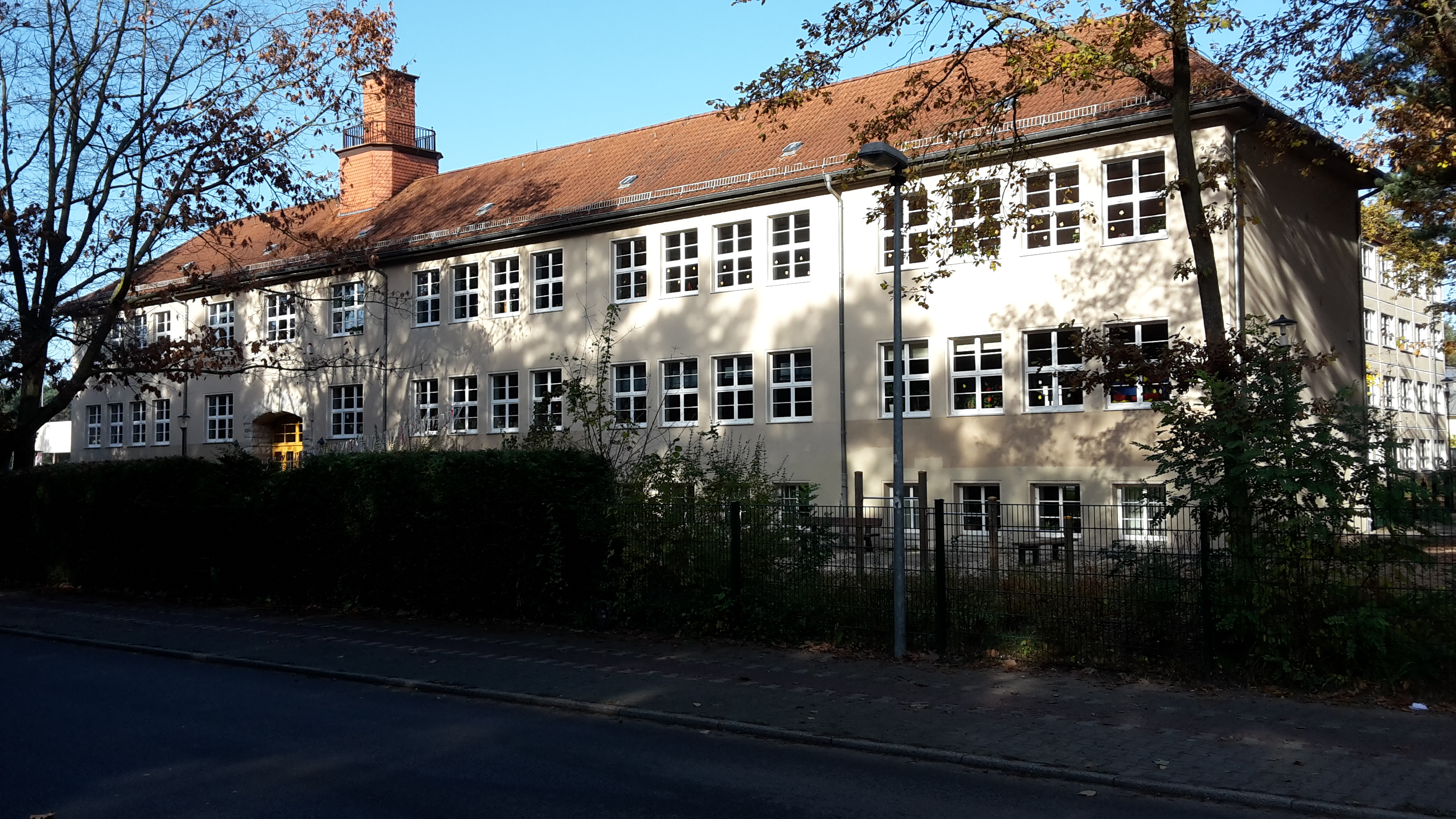 Grundschule mit Hort Schulgebäude in Borgsdorf, 02.11.2014